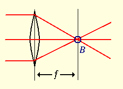 Parallele Lichtstrahlen werden im Brennpunkt gebündelt - you may translate it in english :-)